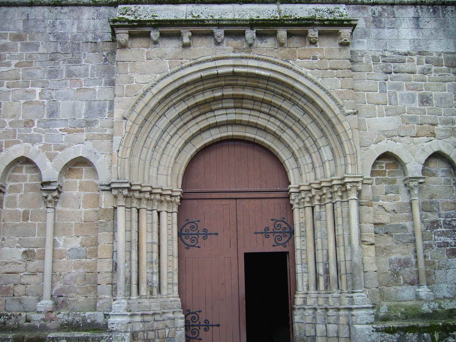 Porĉo de la preĝejo de Léhon